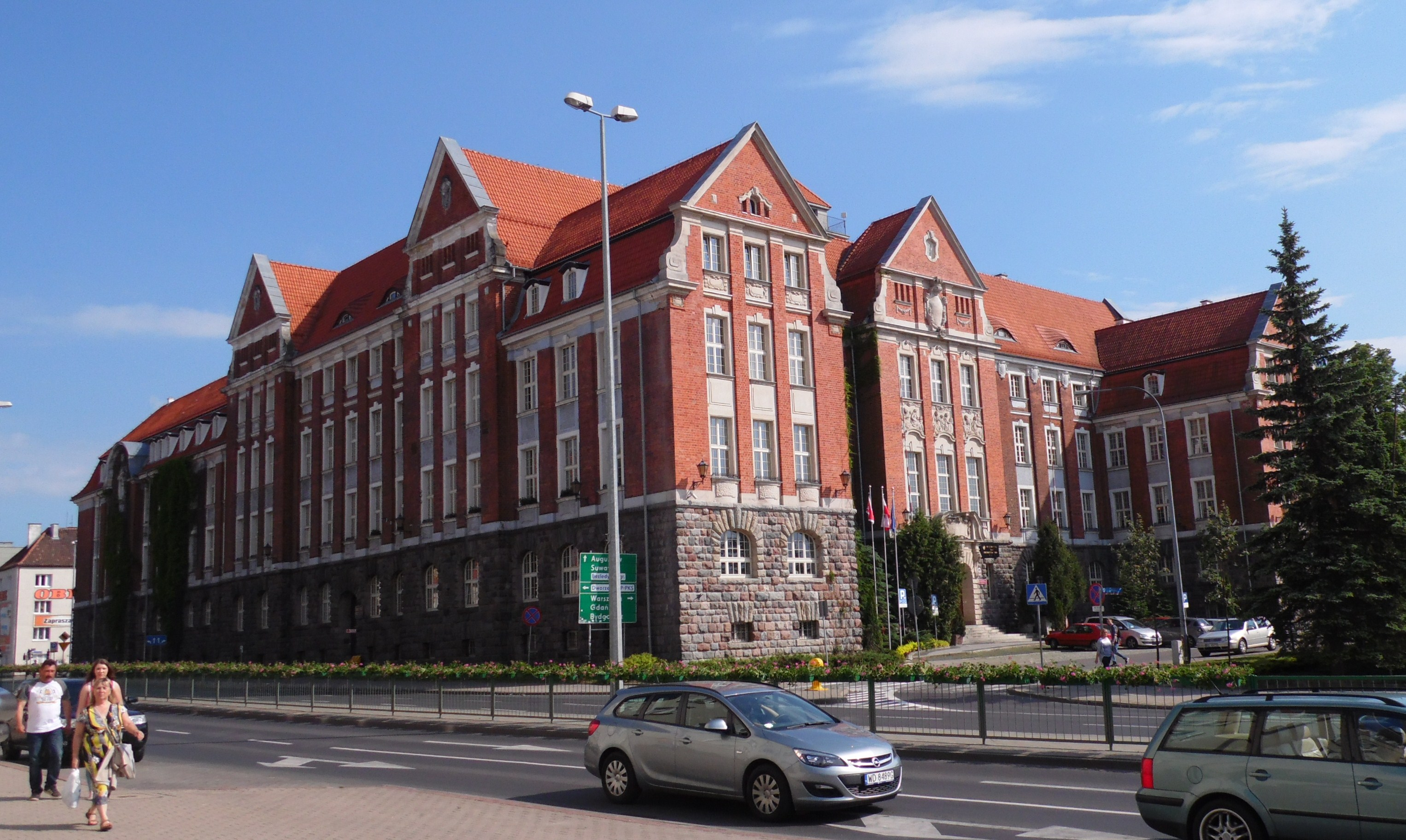 GMACH BYŁEJ DOKP.